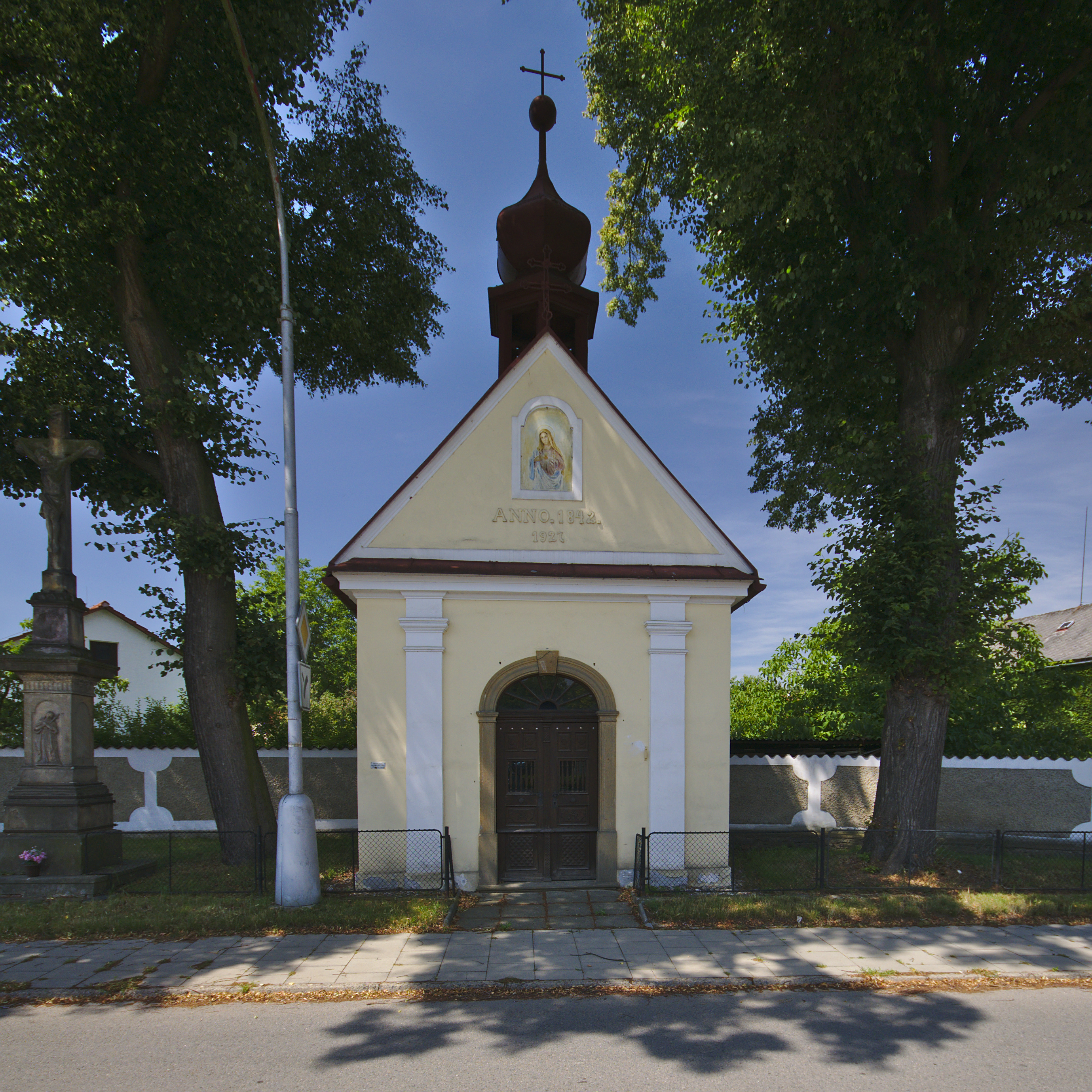 Kaple na ulici Černovírská, Černovír, Olomouc